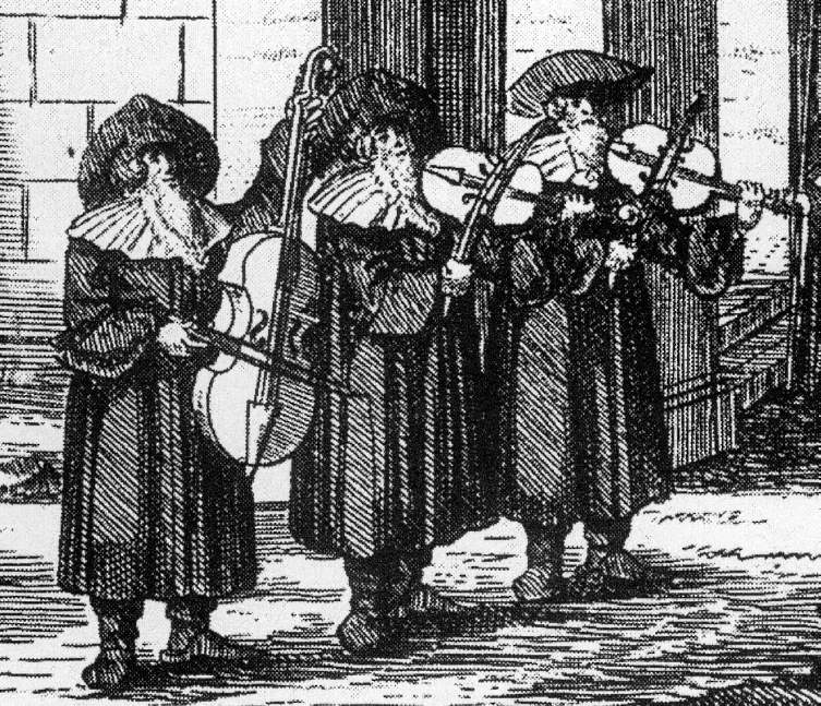 "Judenhochzeit" Ausschnitt (Streichtrio)